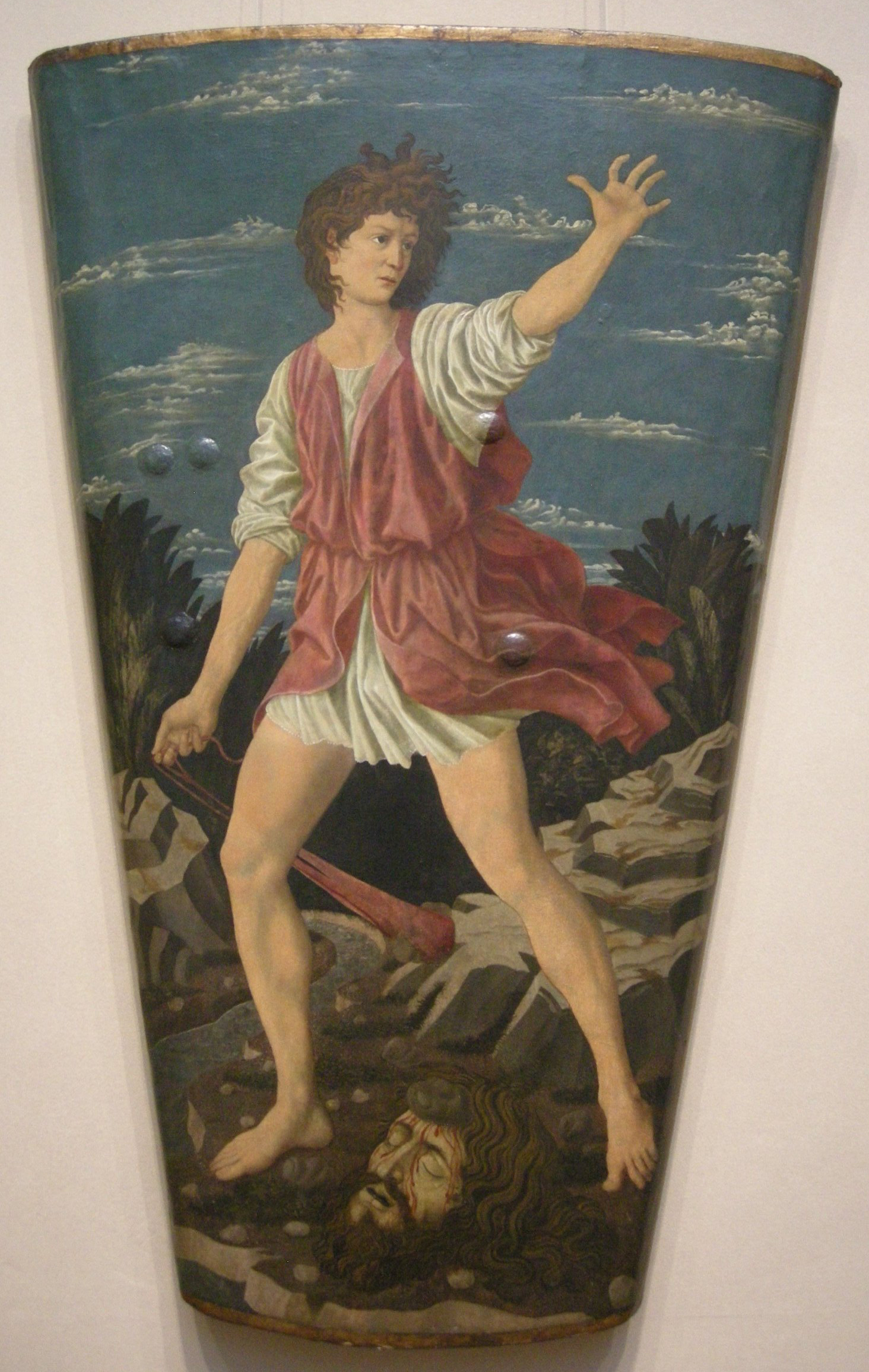 Andrea del castagno, scudo di david con la testa di golia, 1450-55 circa